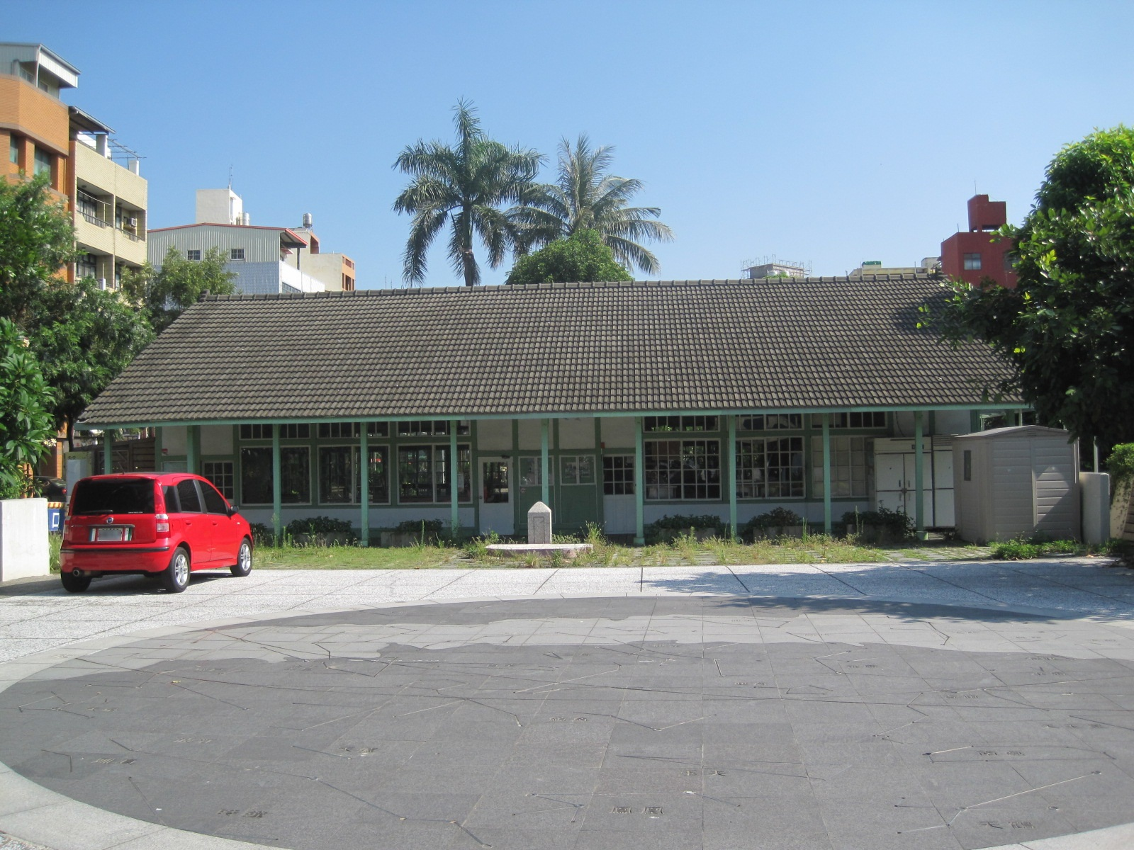 原彰化第二幼稚園